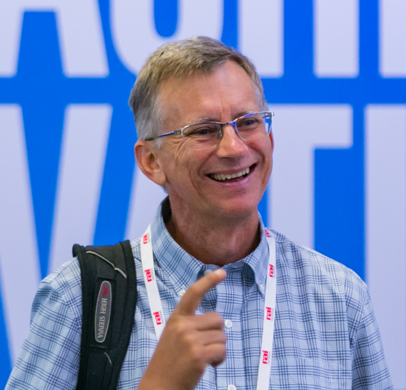 OpenNetworkingSummit_Europe_Amsterdam_180927_highres-69